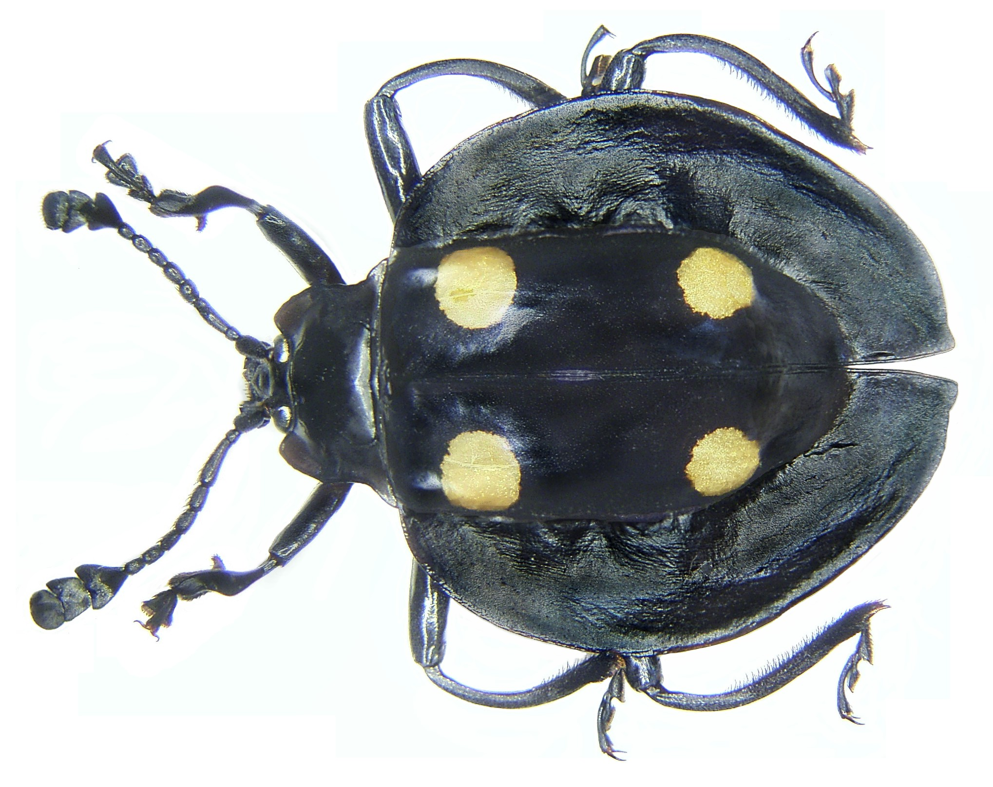 Familie: Endomychidae Grösse: 18 mm Fundort: Thailand, Khao Lak leg. det. A.Skale, 2007 Foto: U.Schmidt, 2007